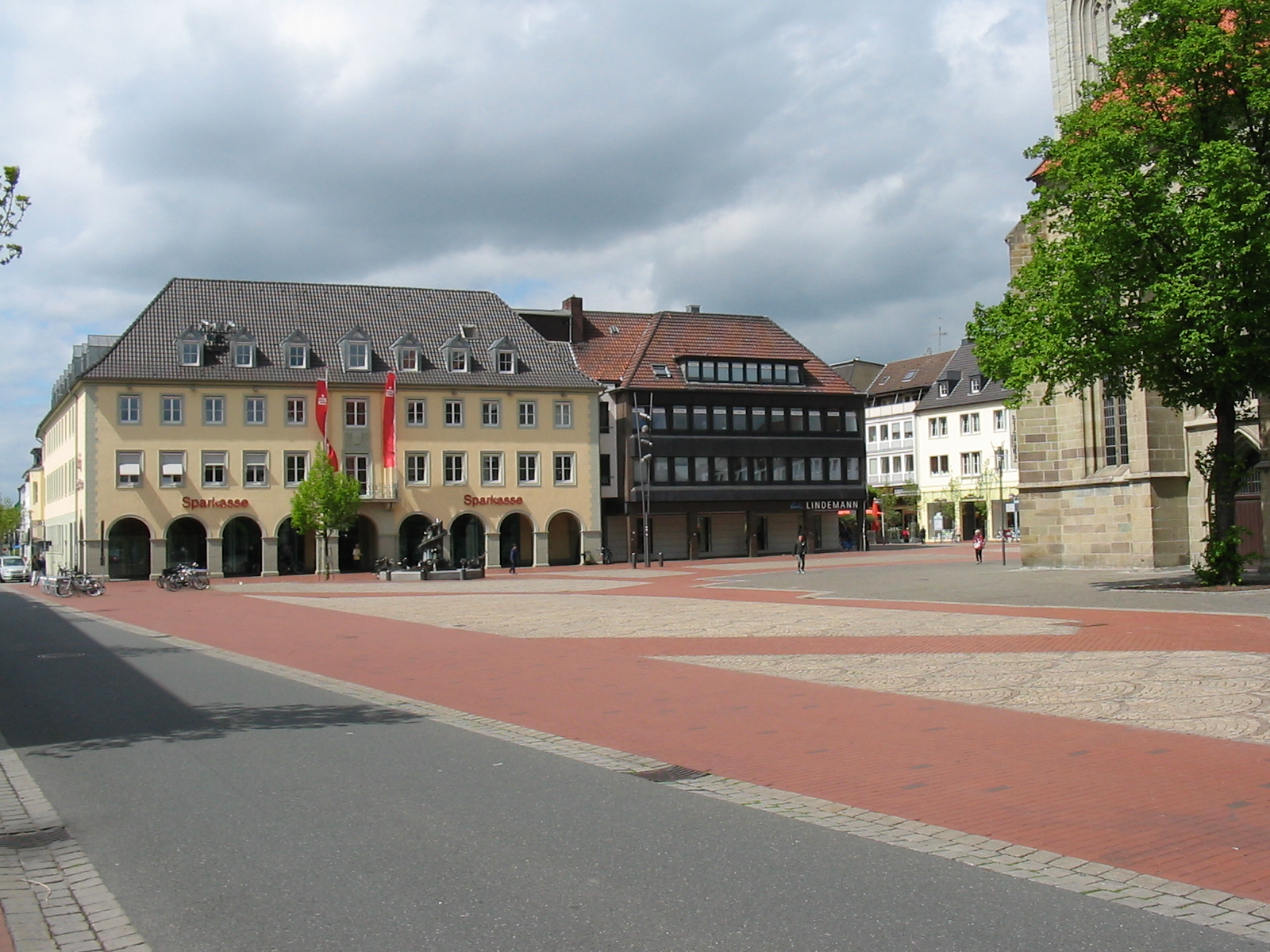 Marktplatz Hamm, Blickrichtung Sparkasse